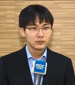 (청주MBC뉴스) 청남대 바둑전쟁 박정환 9단 웃다